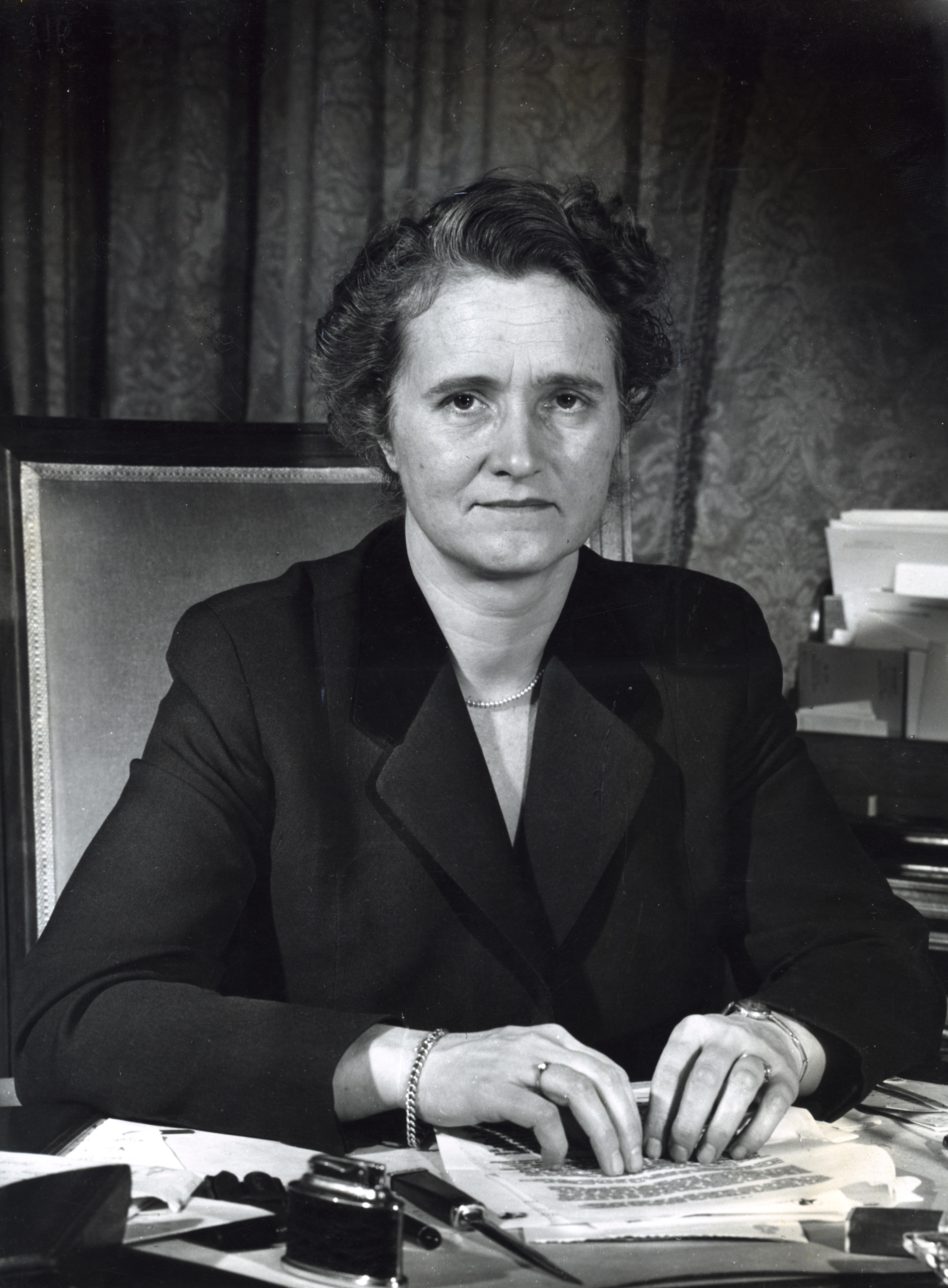 Minister Marga Klompé (1912-1986) zittend aan een bureau. Zonder plaats [Nederland], 1958.